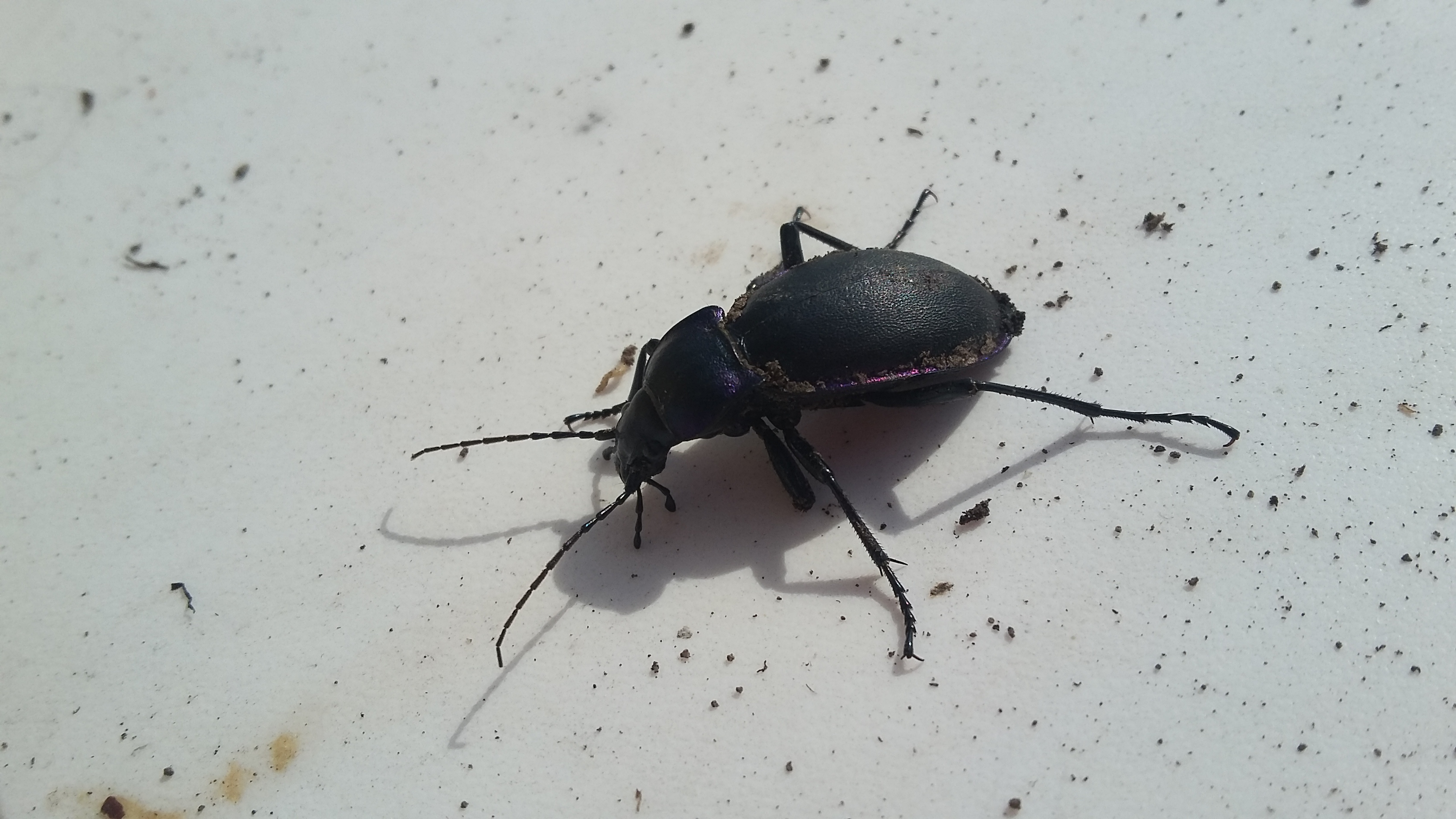 bng vrehtzt